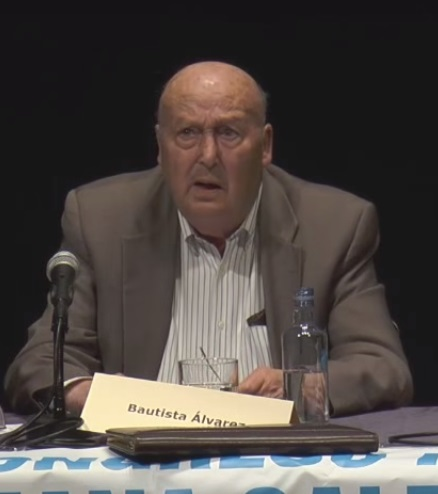 Bautista Álvarez